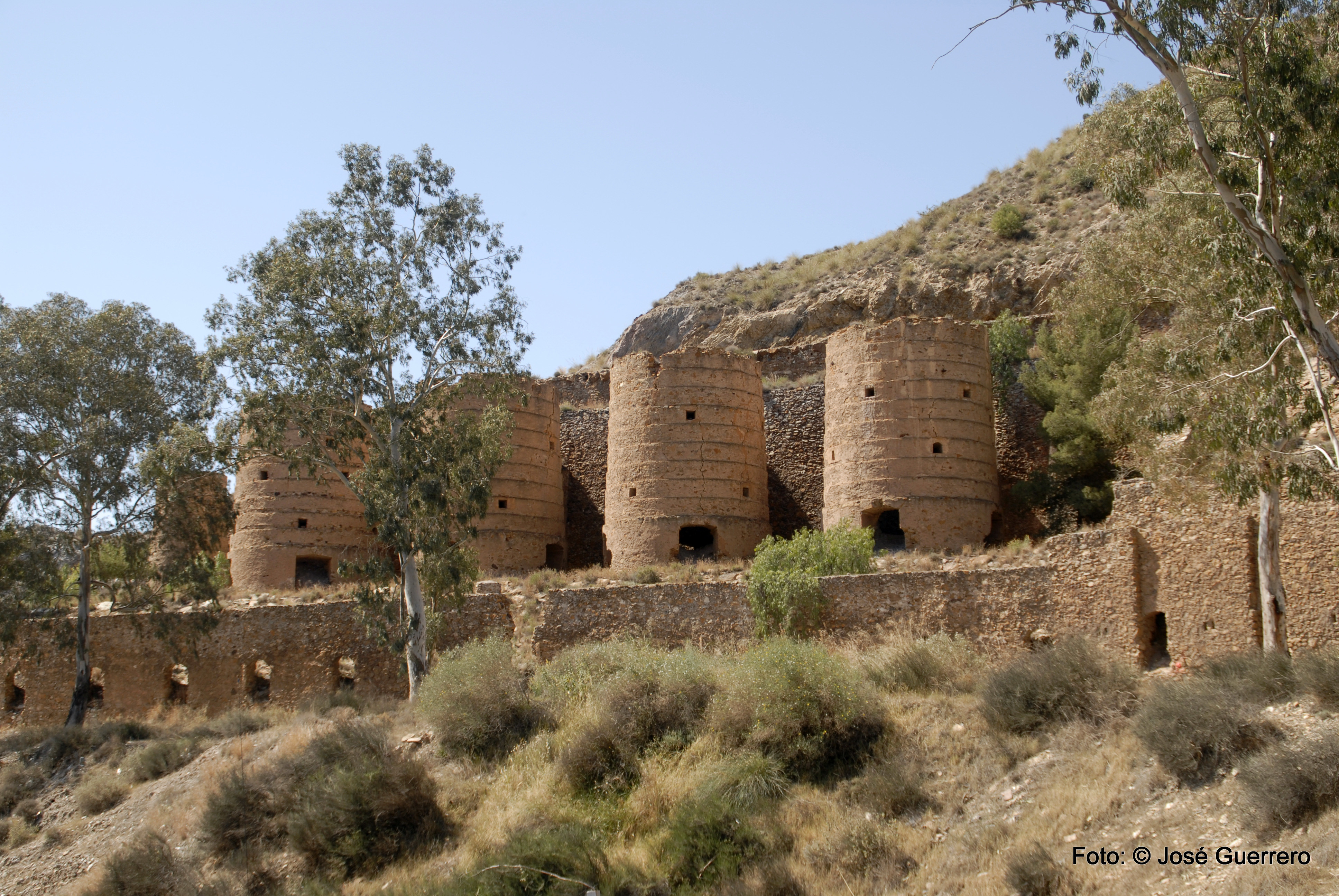 Restos Mineros Sierra de Almagro "Los Tres Pacos"